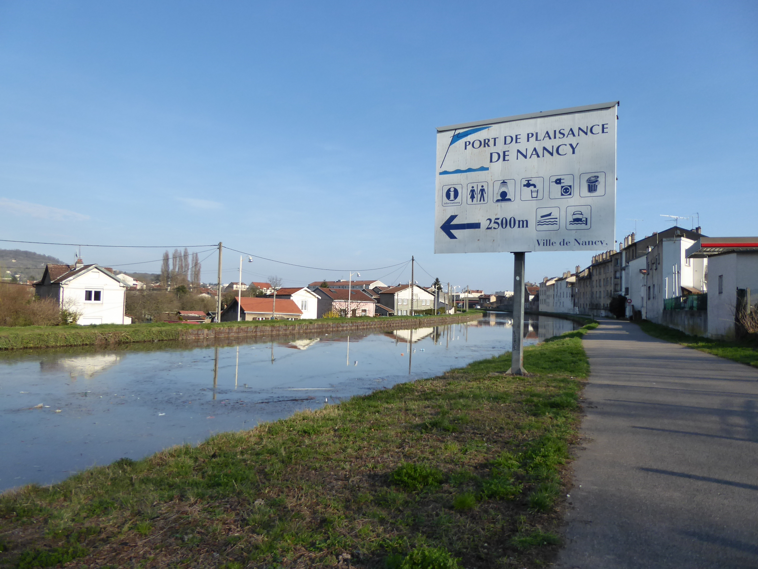 Le canal de la Marne au Rhin à son arrivée nord à Nancy. Panneau indiquant le port de plaisance de Nancy.